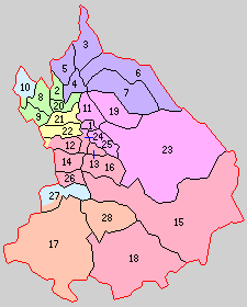 青森県南津軽郡の町村。